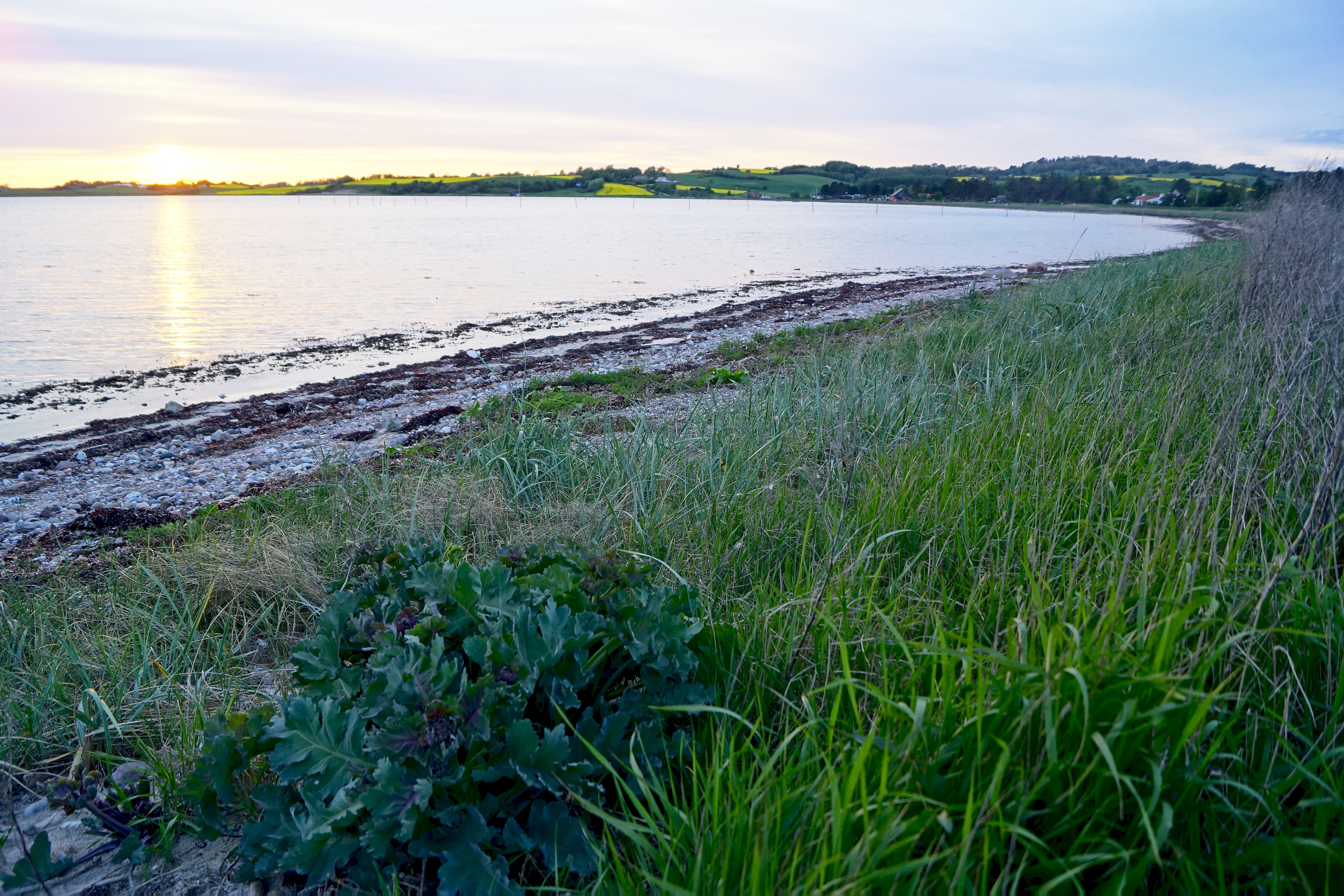 Begtrup Vig kyststrøg 2